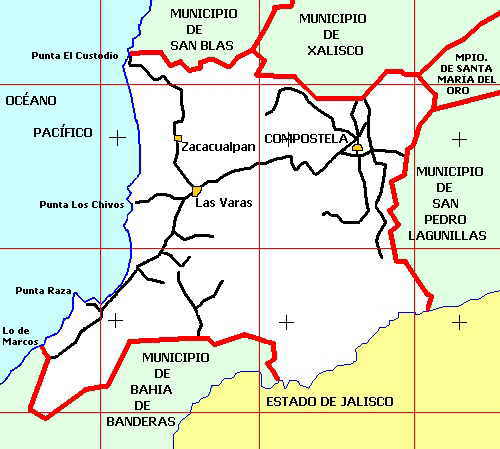 Mapa del Municipio de Compostela, Nayarit, Mexico